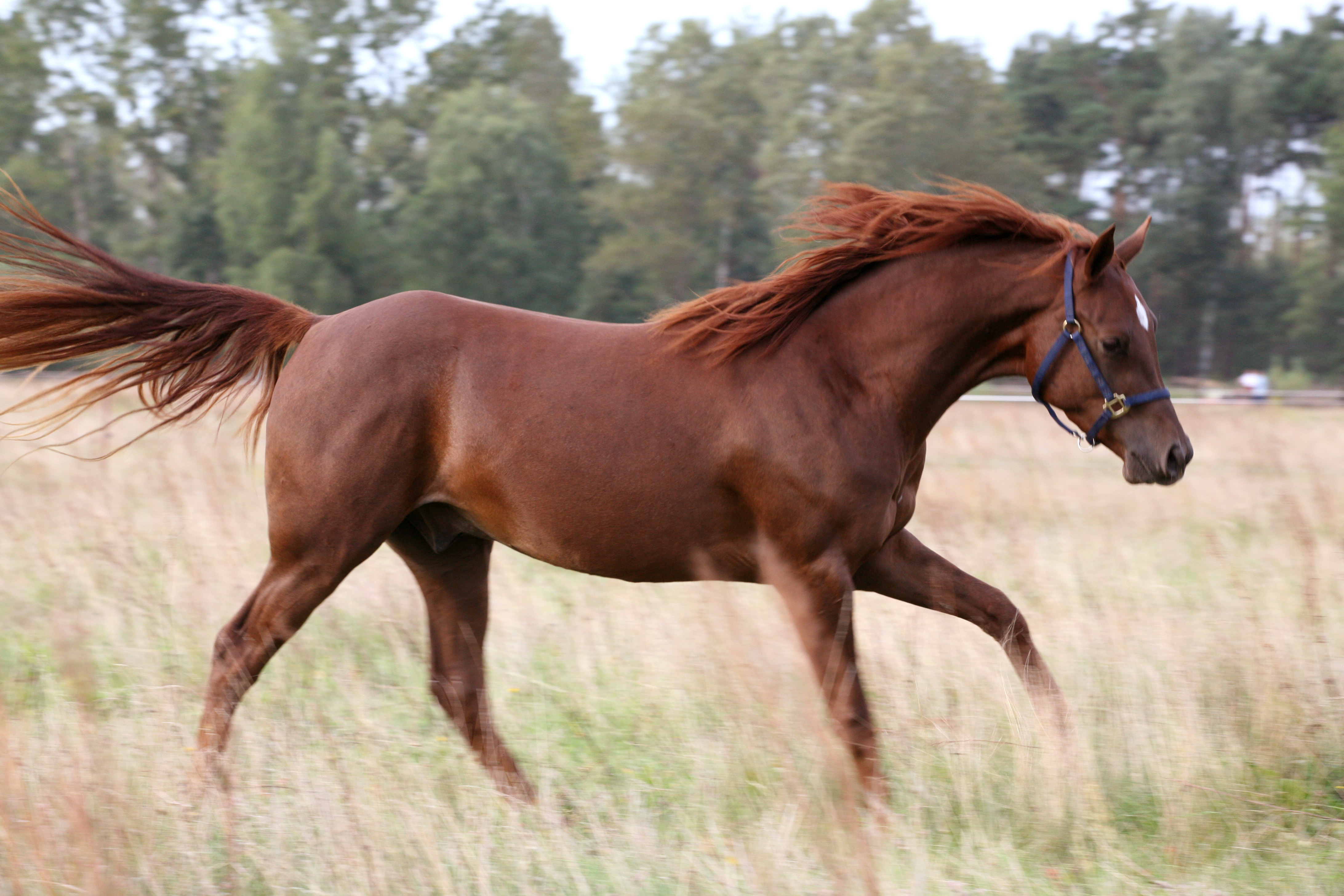 Profil von GH Kamsin